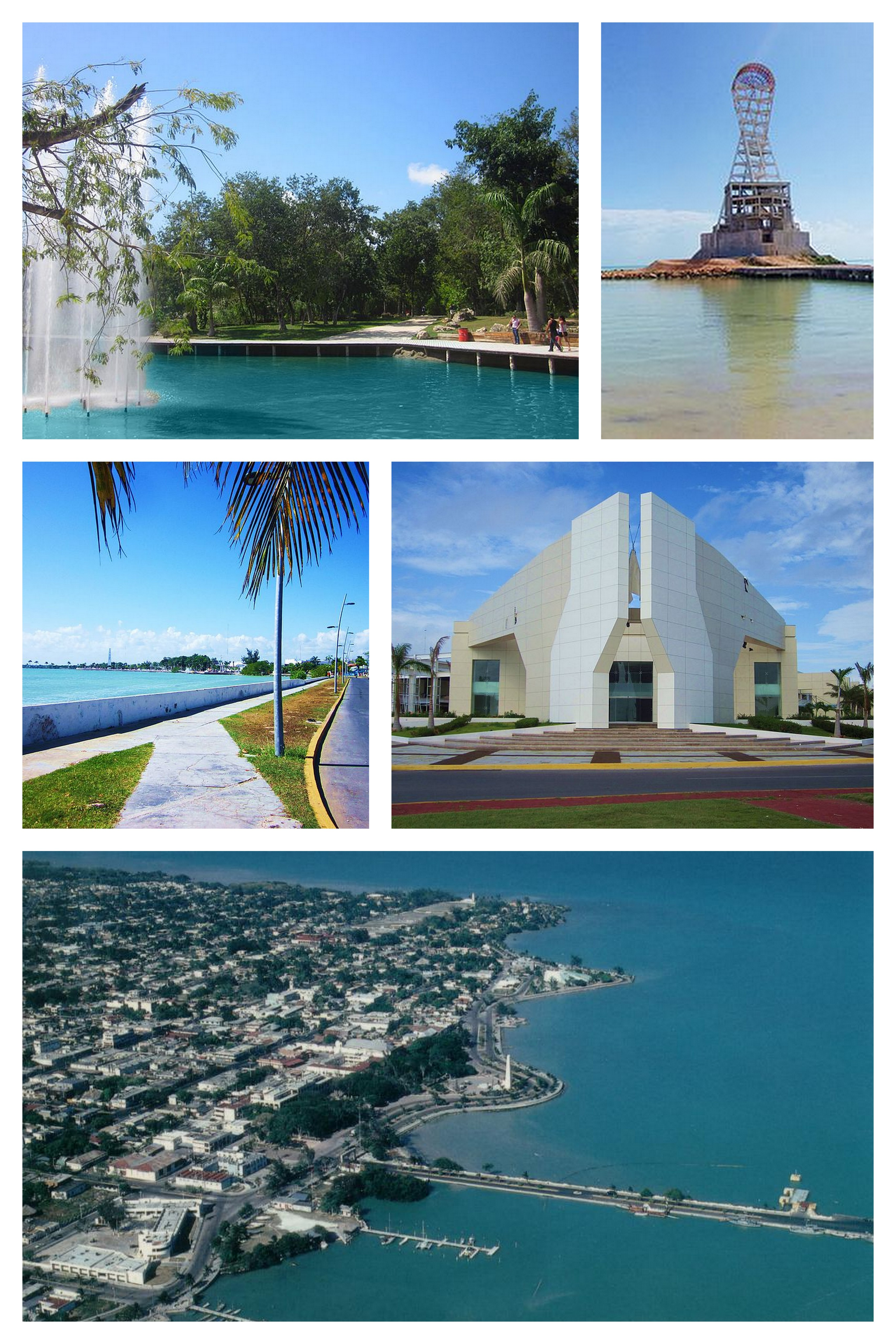 Montaje creado a partir de cinco imágenes en Wikimedia Commons: File:Lake, Biounivezoo, Chetumal. - panoramio.jpg File:Bahía de Chetumal y Monumento al Mestizaje, Chetumal, Q. Roo - panoramio.jpg File:Convention Center, Chetumal, Q. Roo. - panoramio.jpg File:Boulevard, atras del Congreso, Chetumal. - panoramio.jpg File:Chetumal aerea.jpg